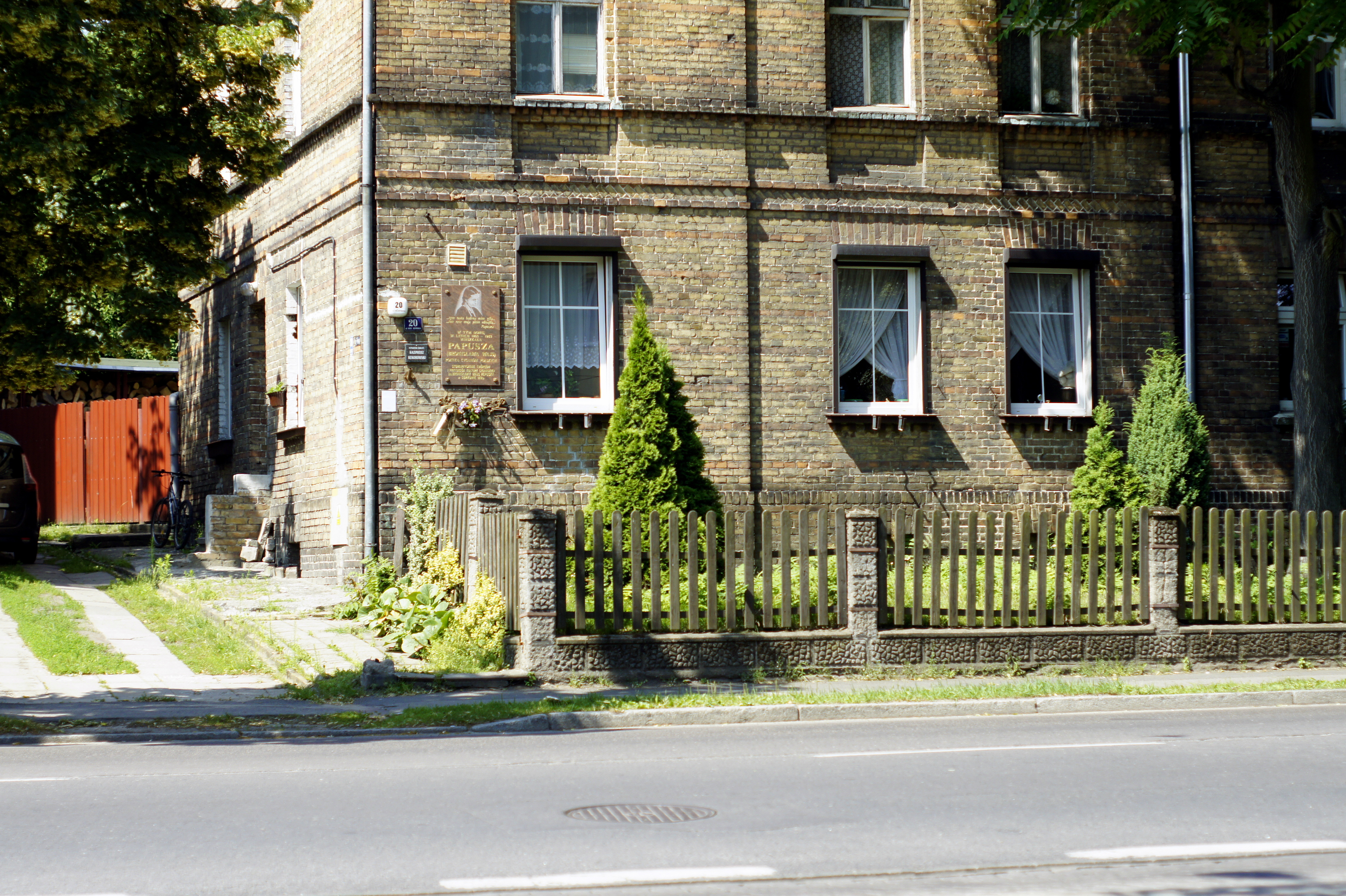 Gorzów Wlkp., ul. Kosynierów Gdyńskich 20. W tym domu w latach 1959 - 1983 mieszkała Papusza.